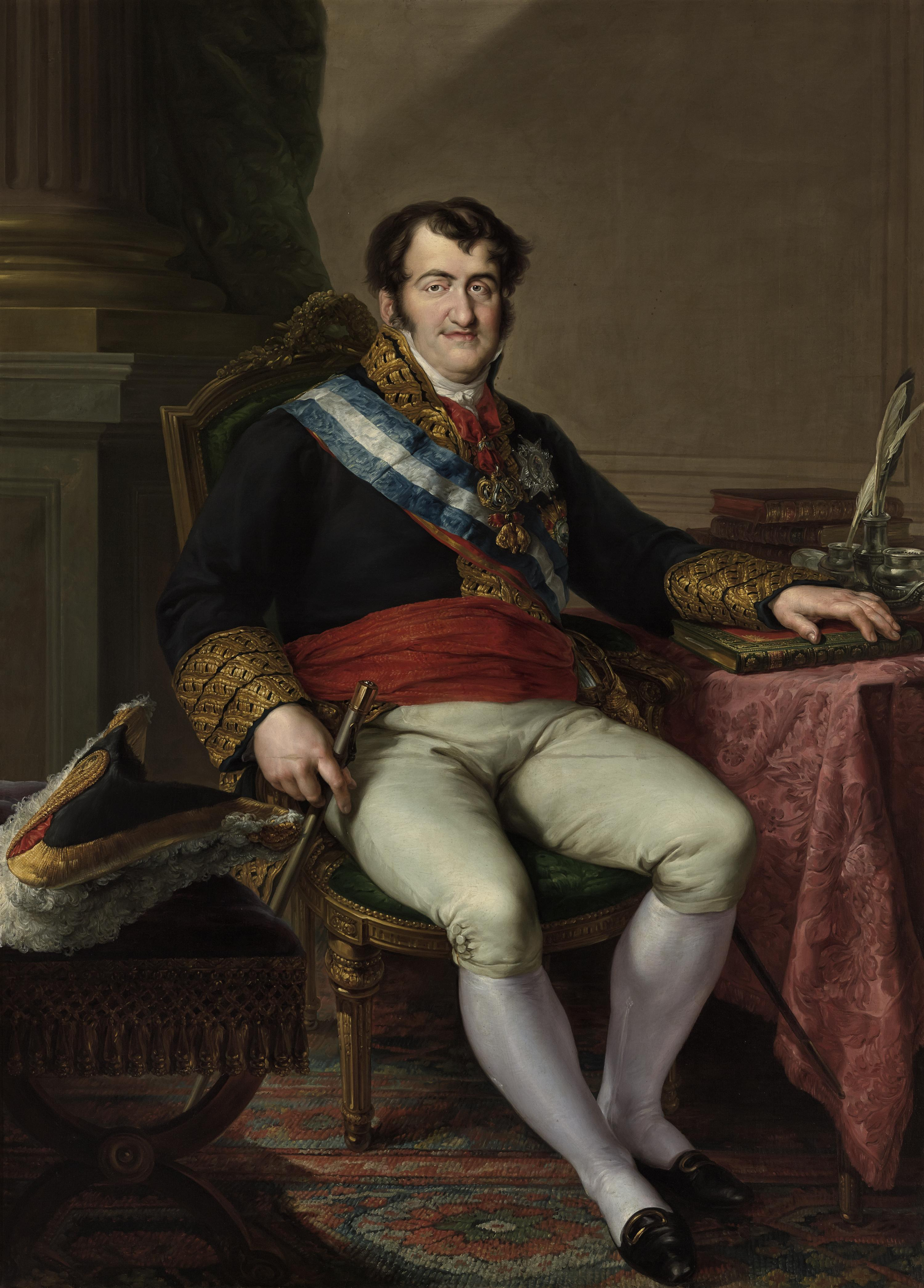 Retrato del rey Fernando VII de España (1784-1833), con uniforme de capitán general y portando la banda de la Orden de Carlos III.